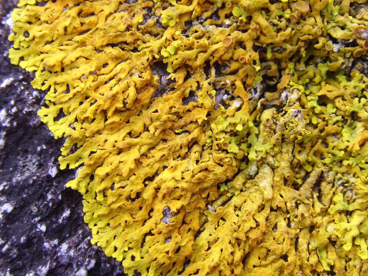 Xanthoria aureola, pointe de Penharn (Goulien, Finistère, Bretagne, France)